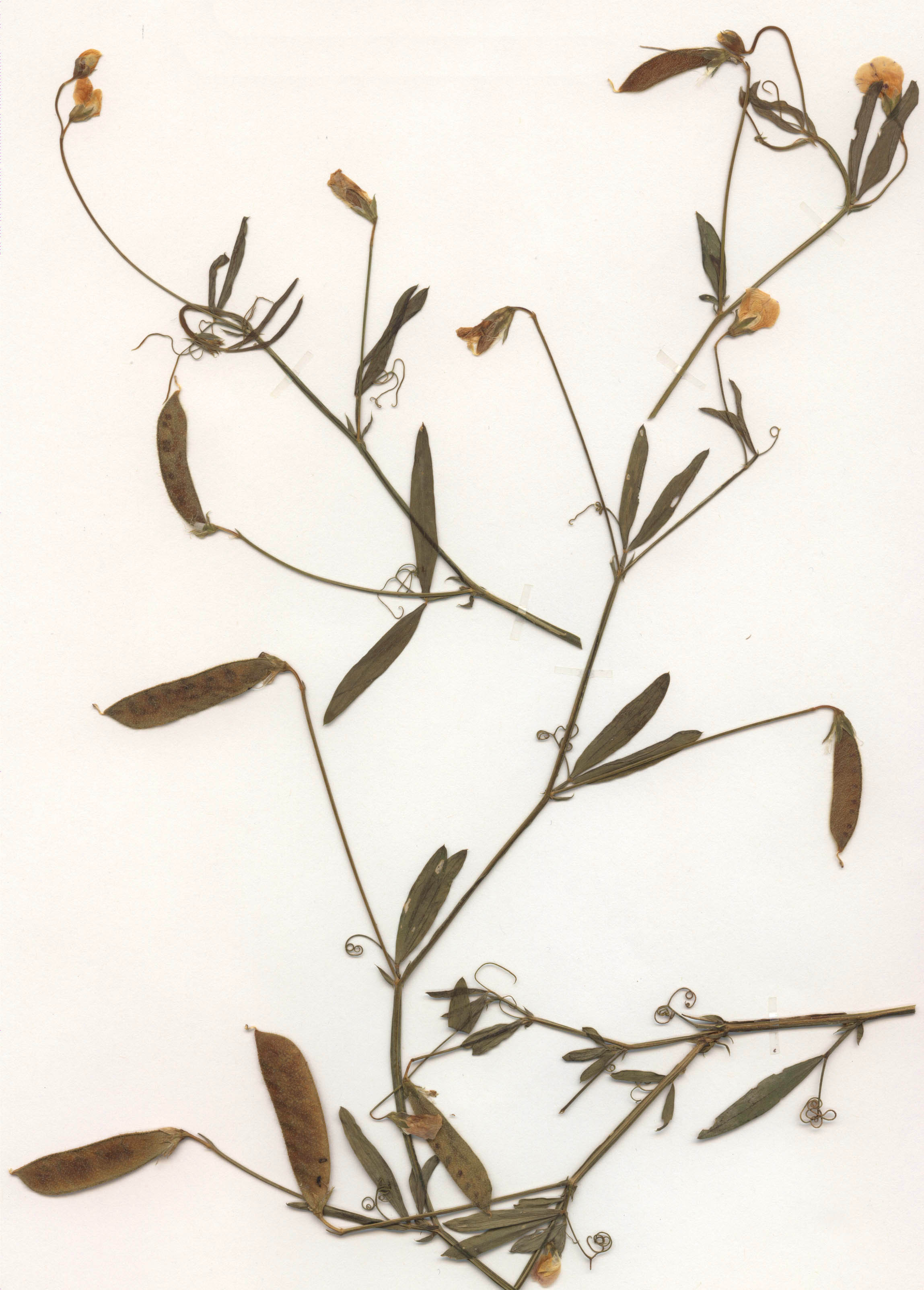 Lathyrus hirsutus, eigener Herbarbeleg